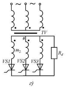 Файл запозичений з конспекту лекцій з курсу "Енергетична елетроніка" факультету електроніки НТУУ"КПІ".